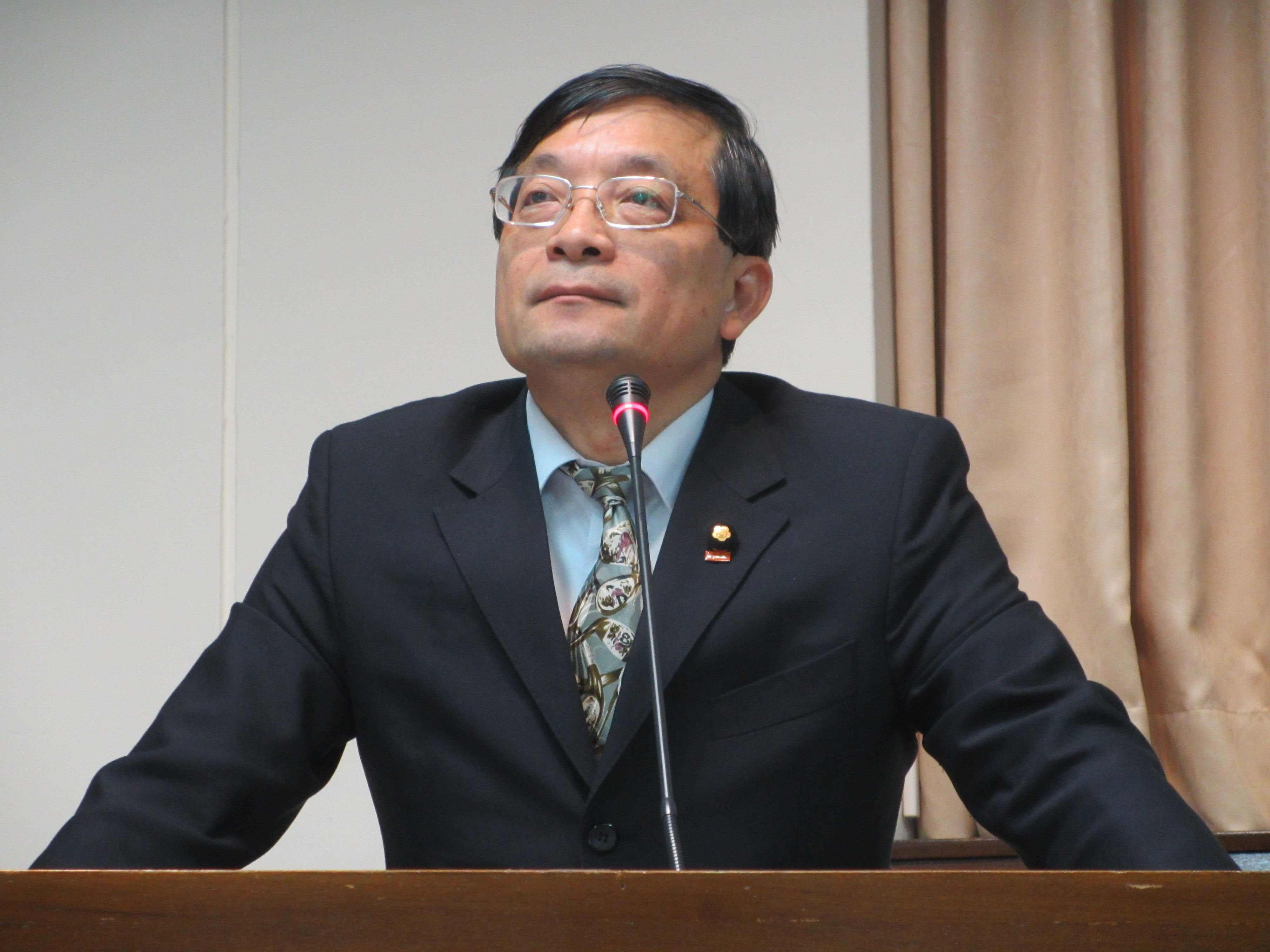 台灣藍營親民黨立委李桐豪